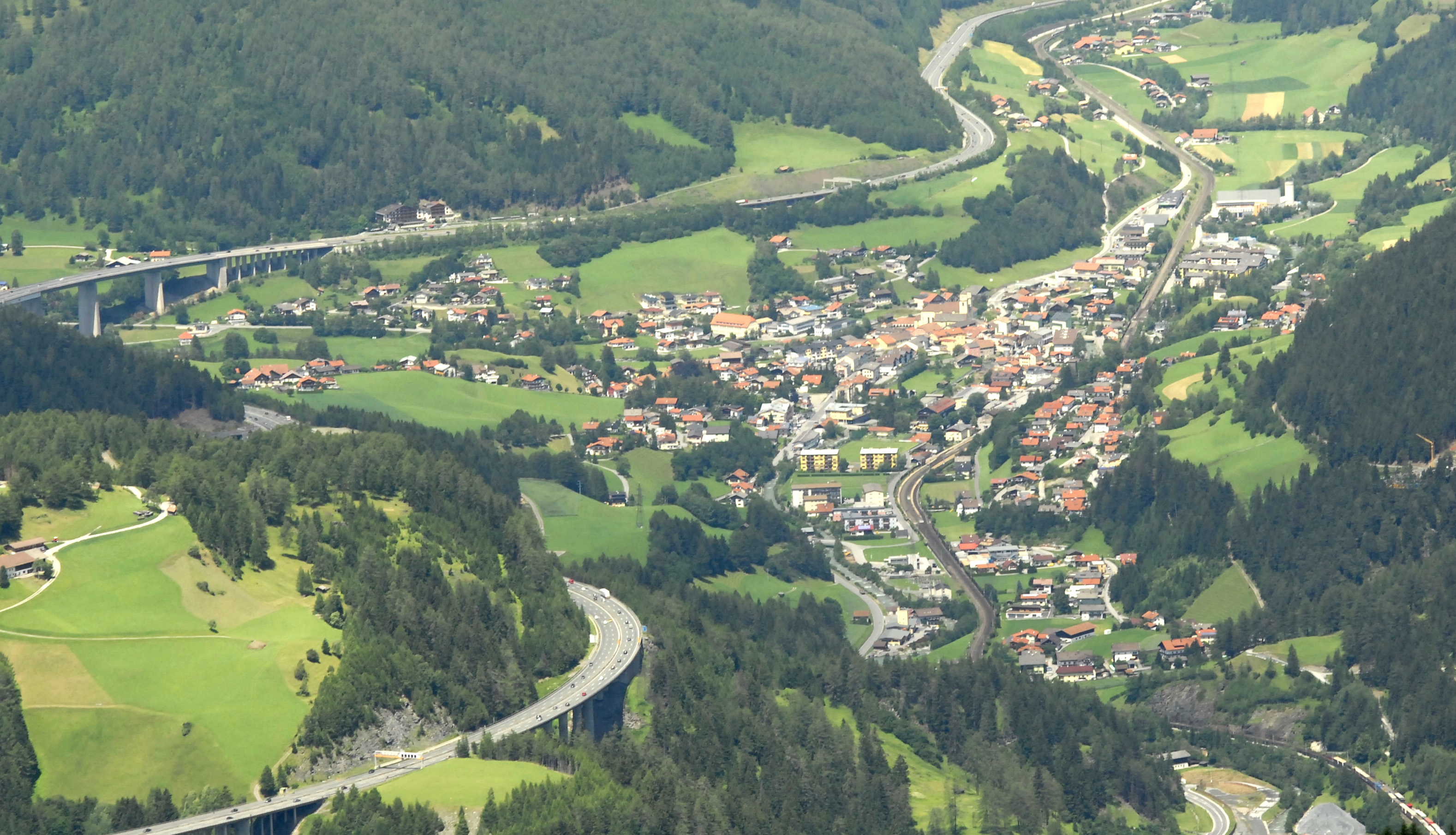 Steinach am Brenner, view from Padauner Kogel